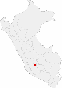 Ubicacion de la Ciudad de Ayacucho en el Perú, imagen modificada por Discjockey.